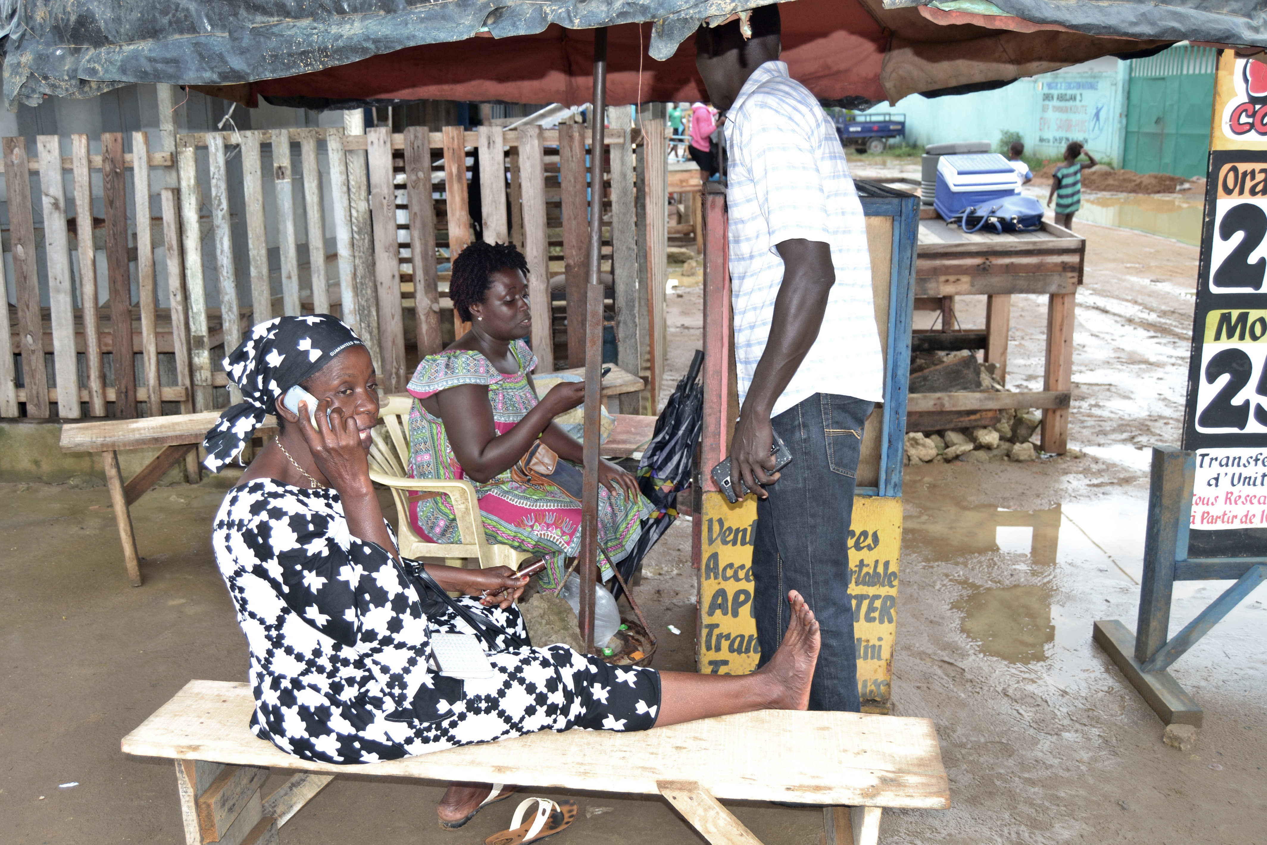 gérante d'une cabine téléphonique dans les rues d'Abidjan This is an image of "African people at work" from Ivory Coast